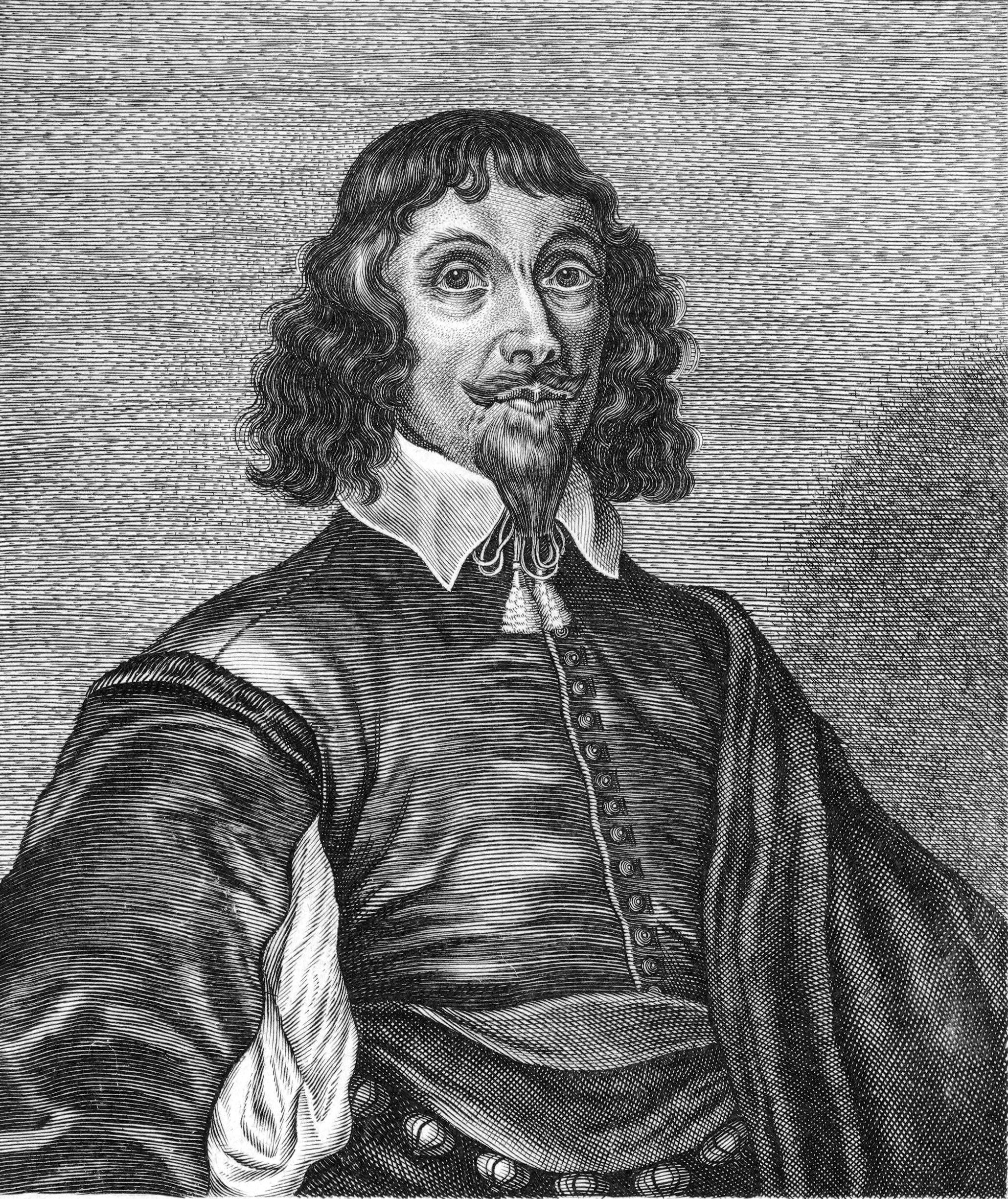 Depicted person: Heinrich Scheidemann